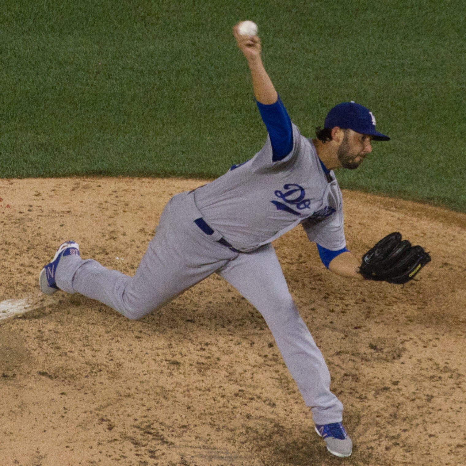 Mike Bolsinger